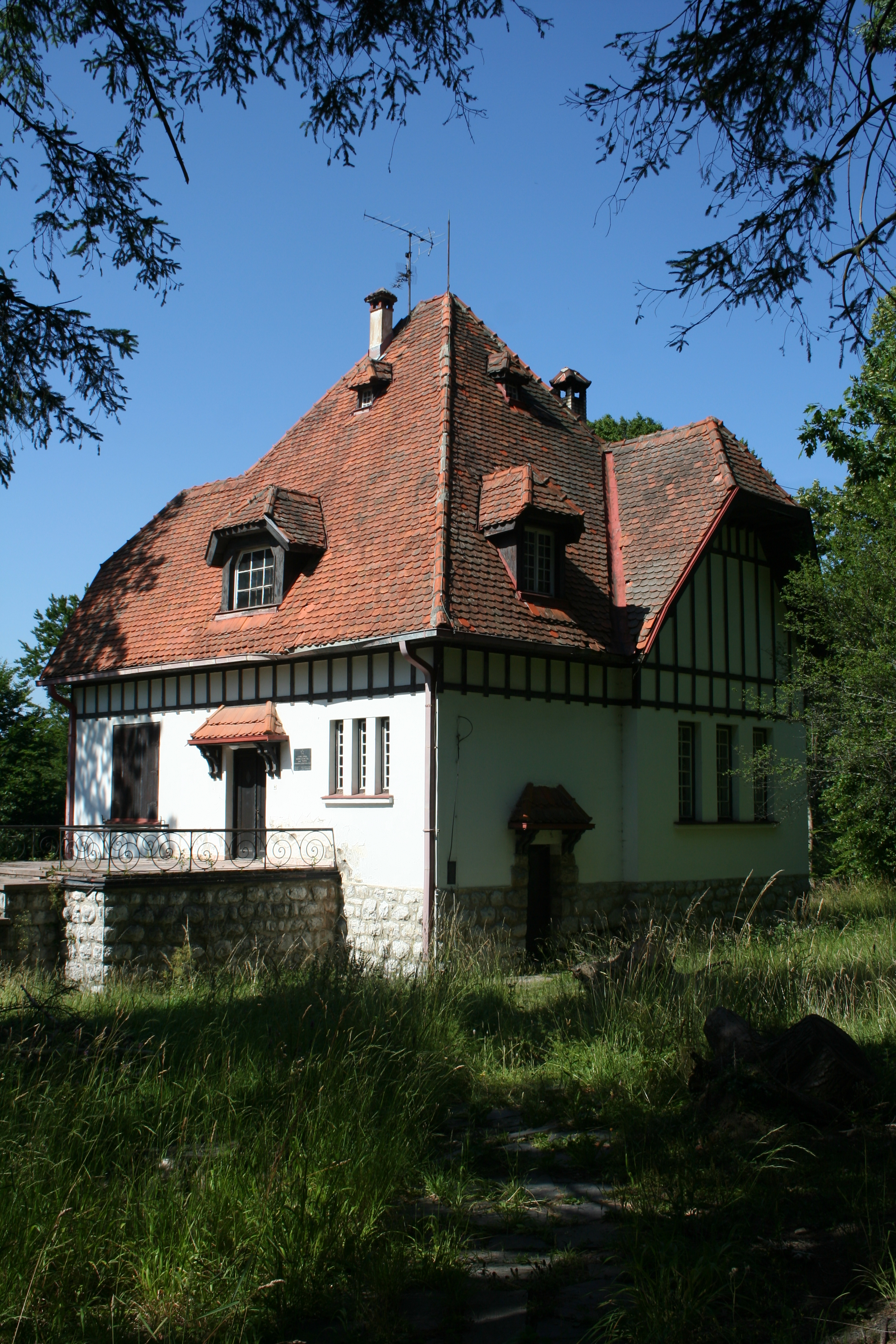 Zlatibor